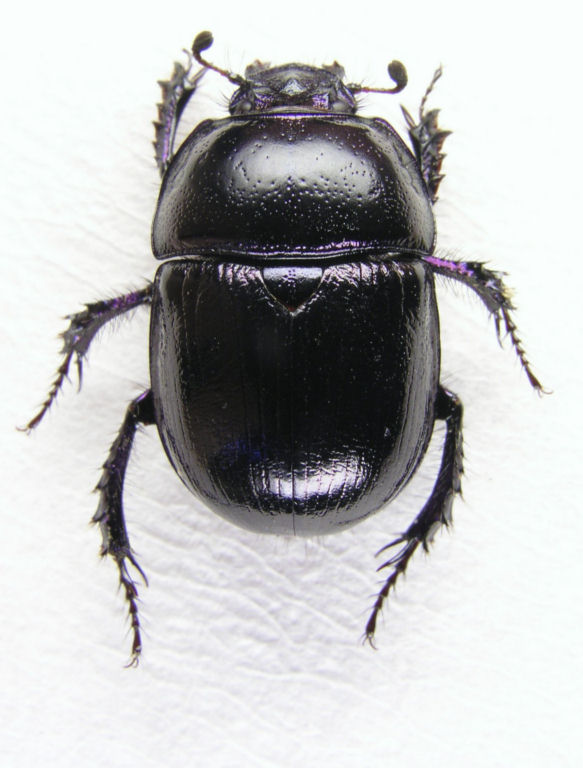 Mestkever, ws Anoplotrupes stercorosus, gevonden emst 10/6/2006